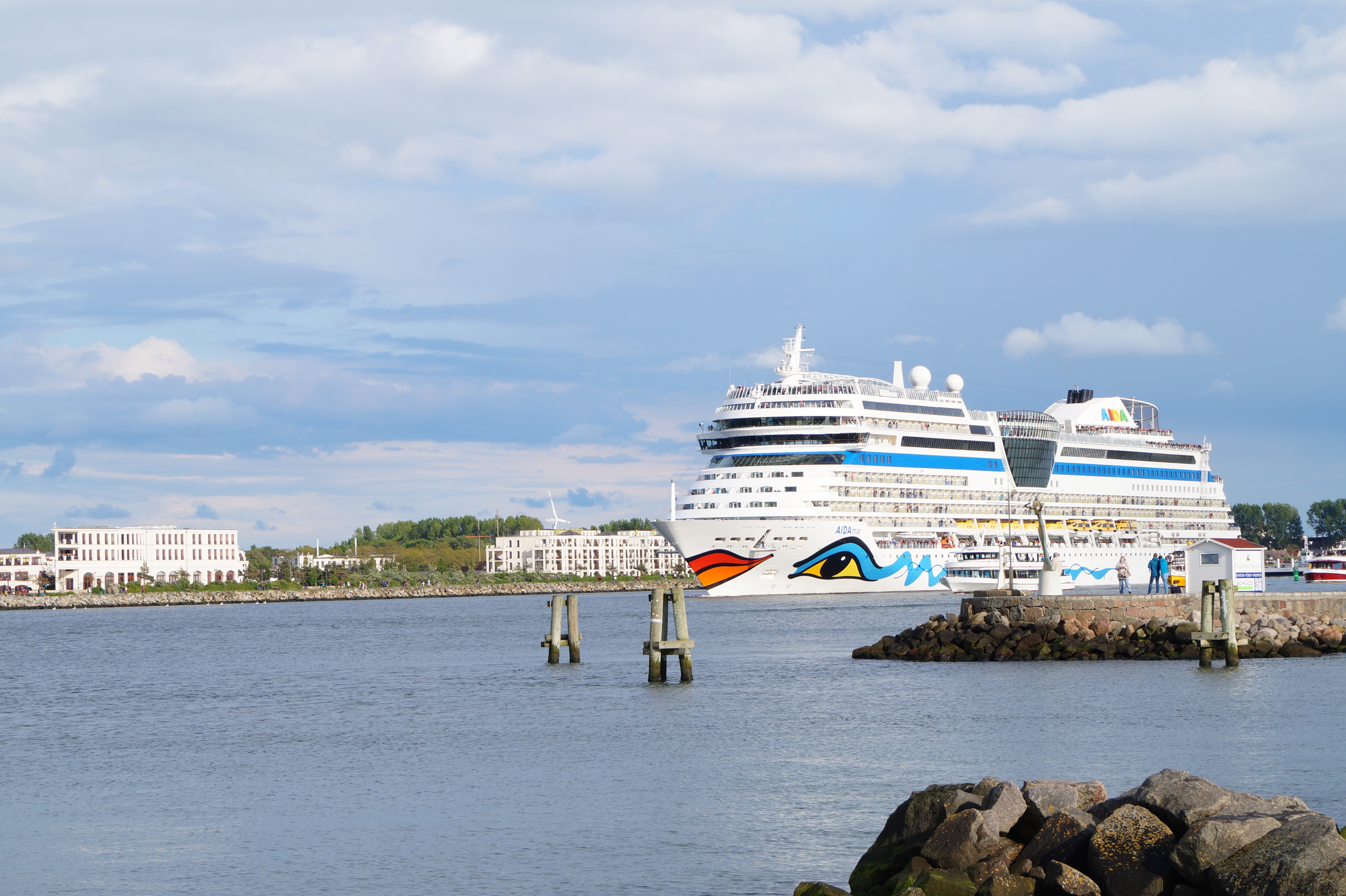 Die AIDAmar am 30.05.2015 beim Auslaufen aus Warnemünde